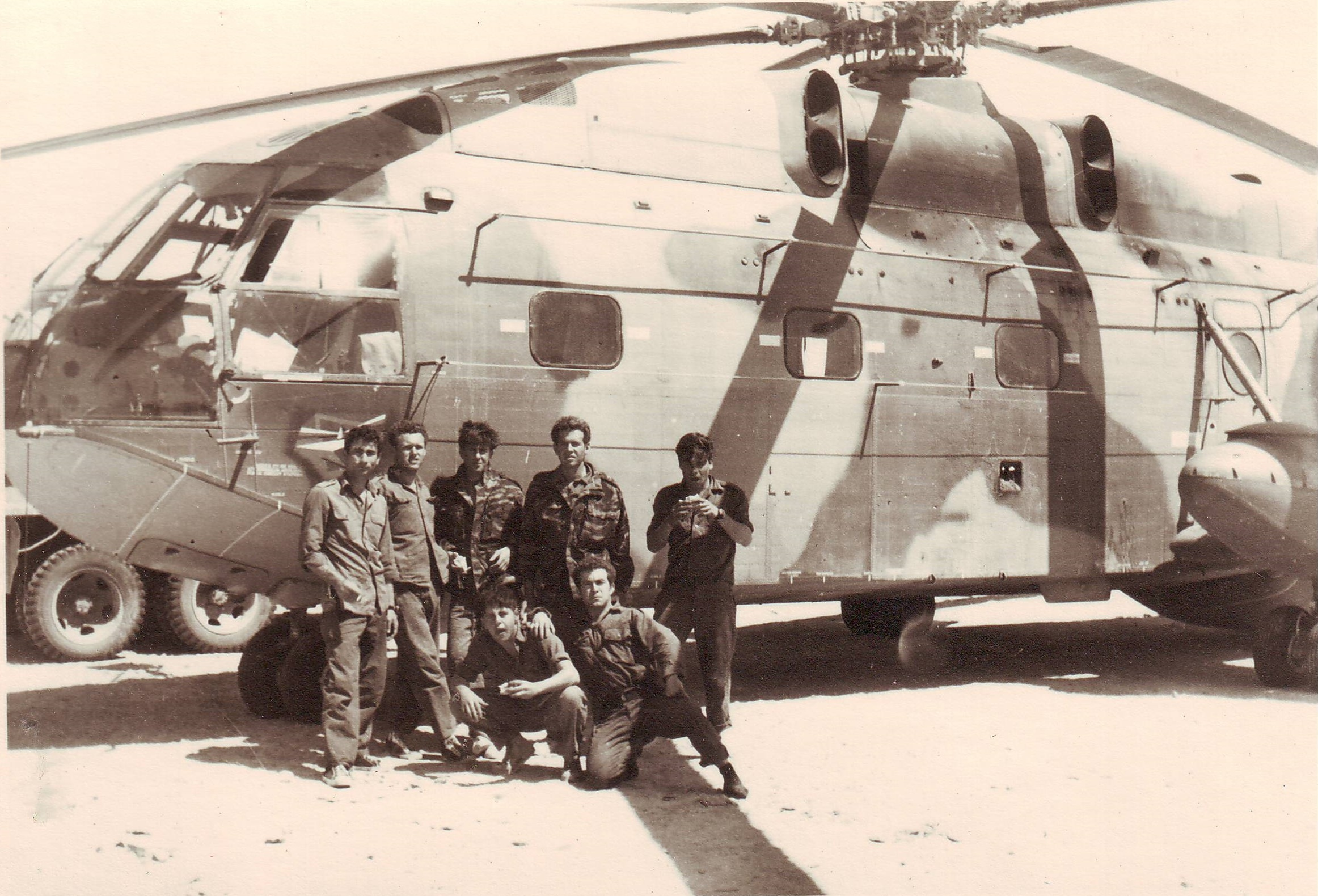 קבוצת לוחמי היחידה מוחזרת במסוק מפעילות בחוף סיני